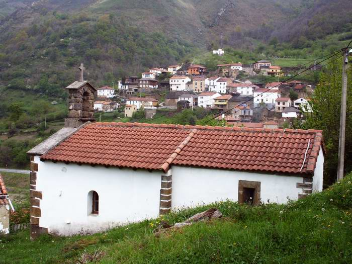 Capilla de las nieves.